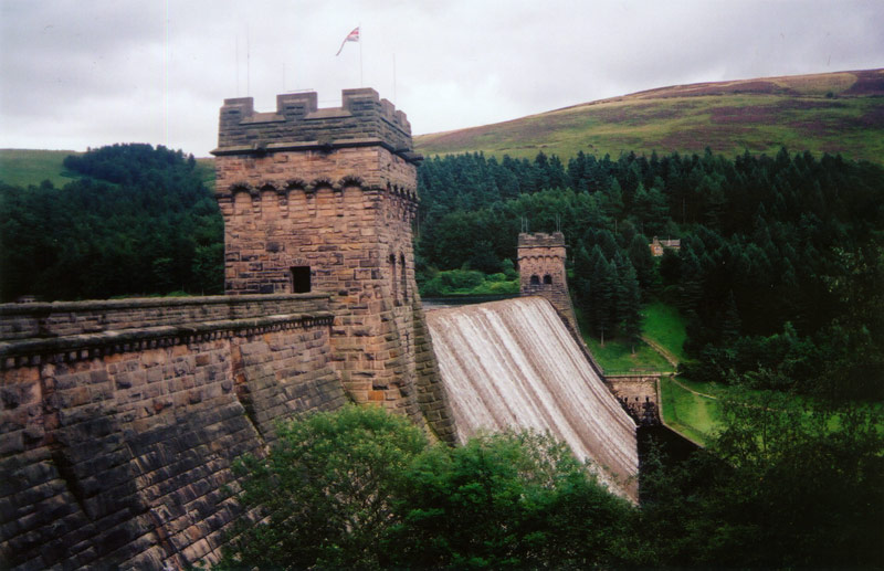 Derwent Dam, Derbyshire, England. ©2002, Jeremy Atherton.